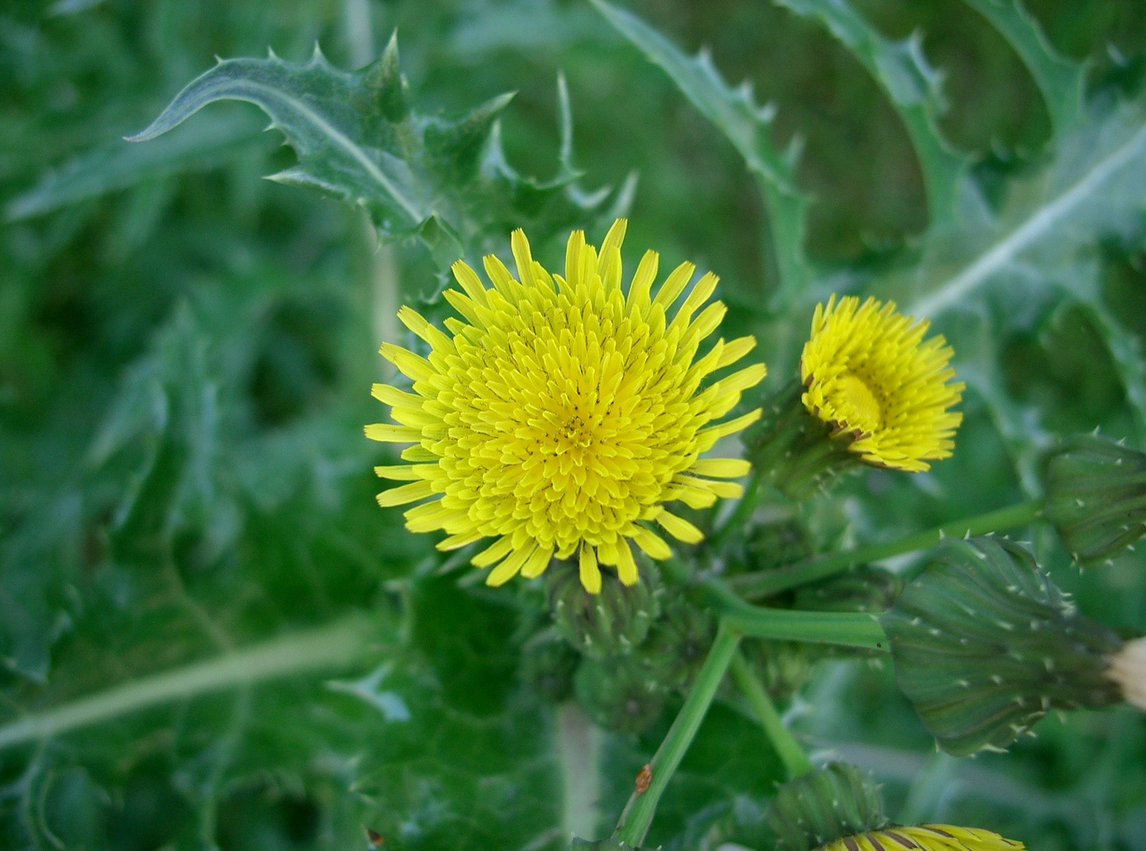 Sonchus asper, Osaka-fu Japan